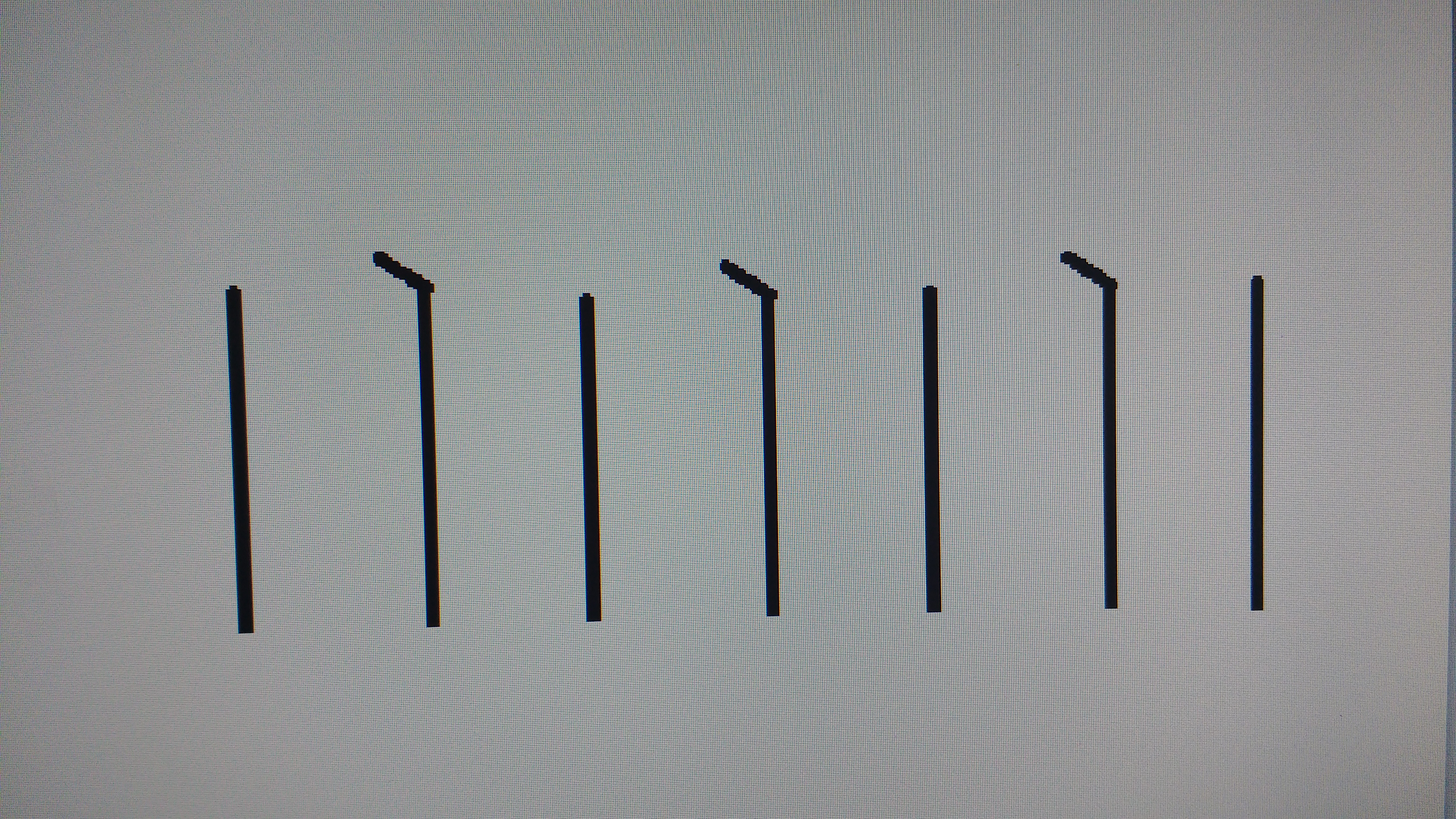 Sons agudos indicados em forte e fraco